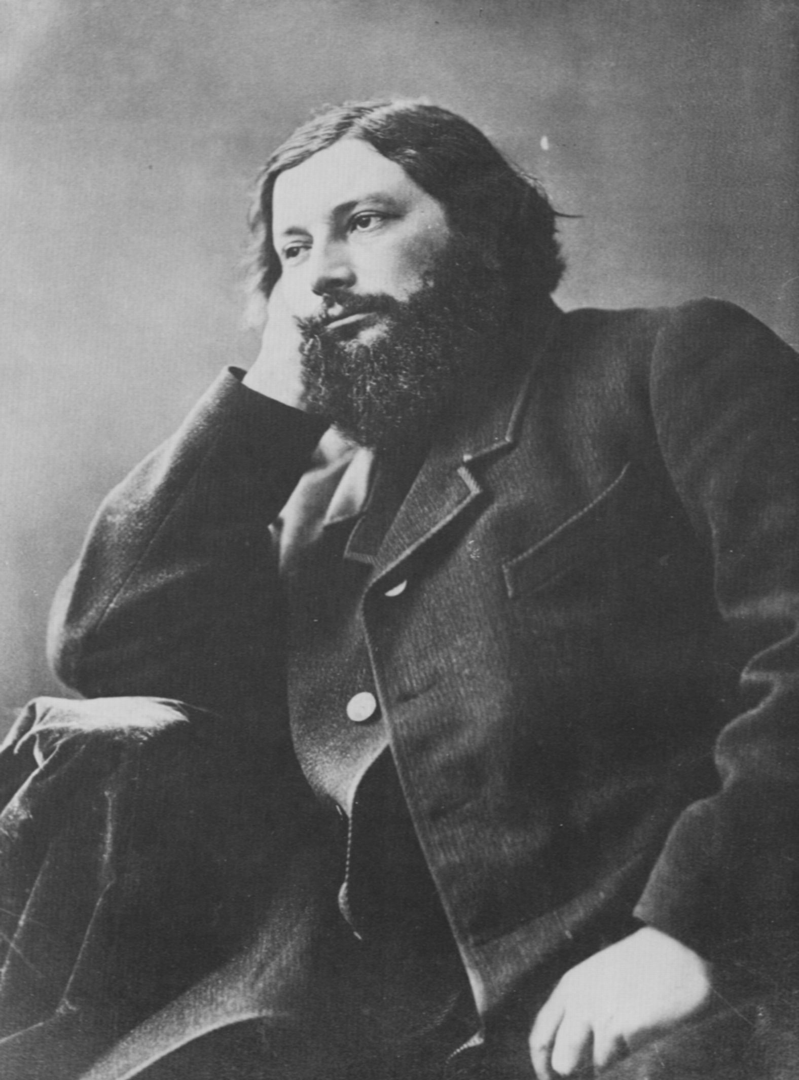 Tournachon, Gaspard-Félix: Gustave Courbet (1819-1877)